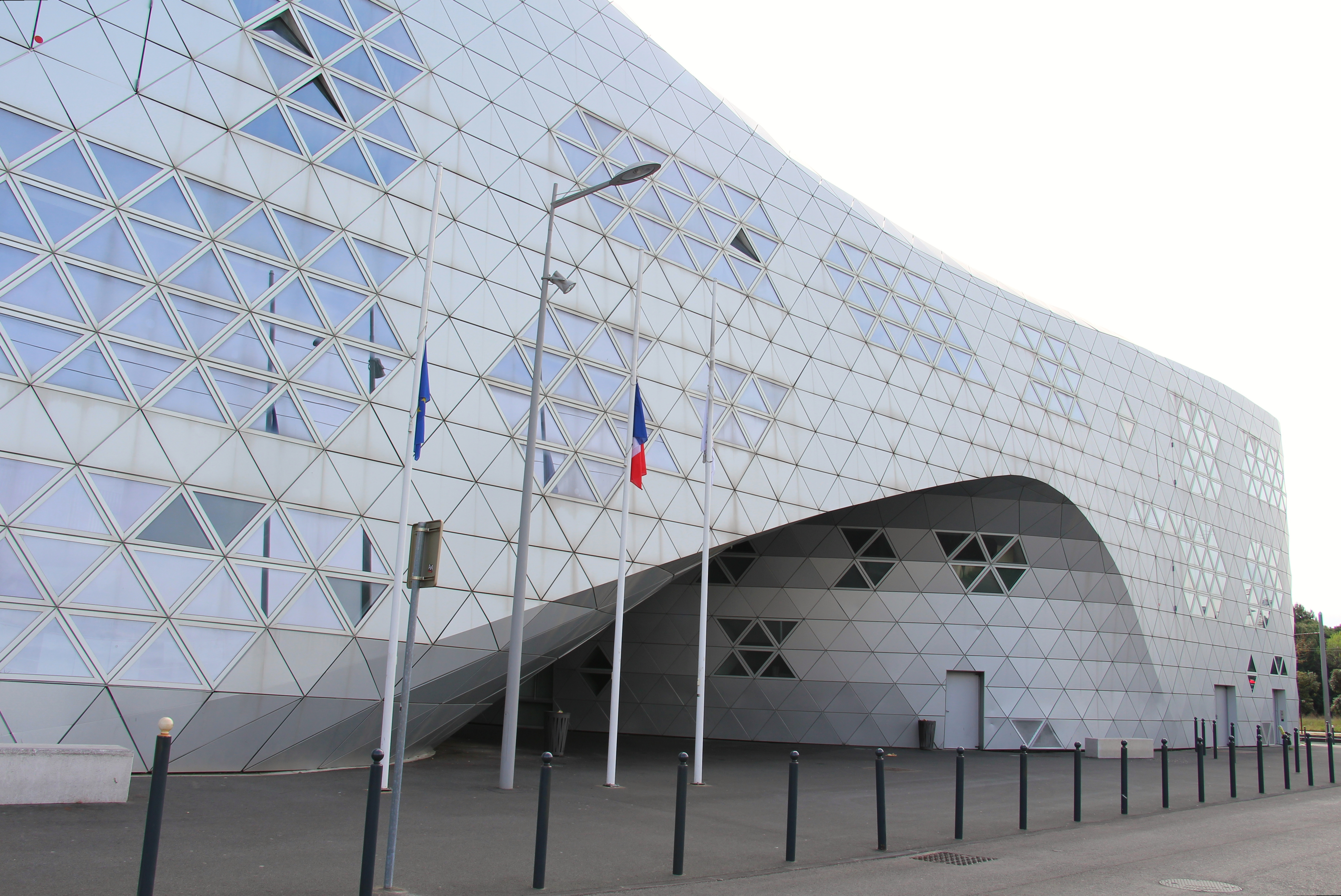 Lycée Georges Frêche à Montpellier